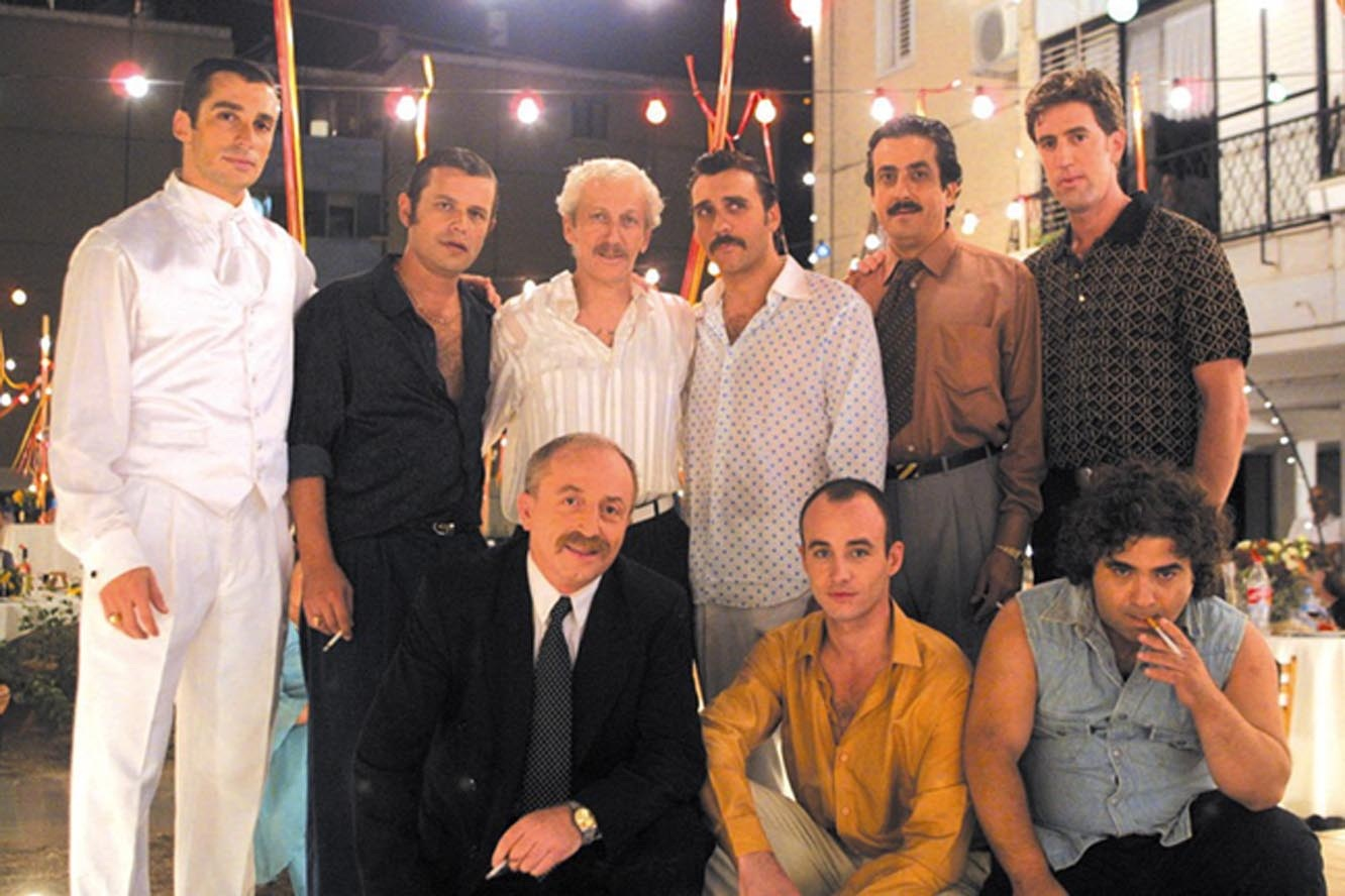 סרטו של דובר קוסאשווילי "מתנה משמיים", 2003.